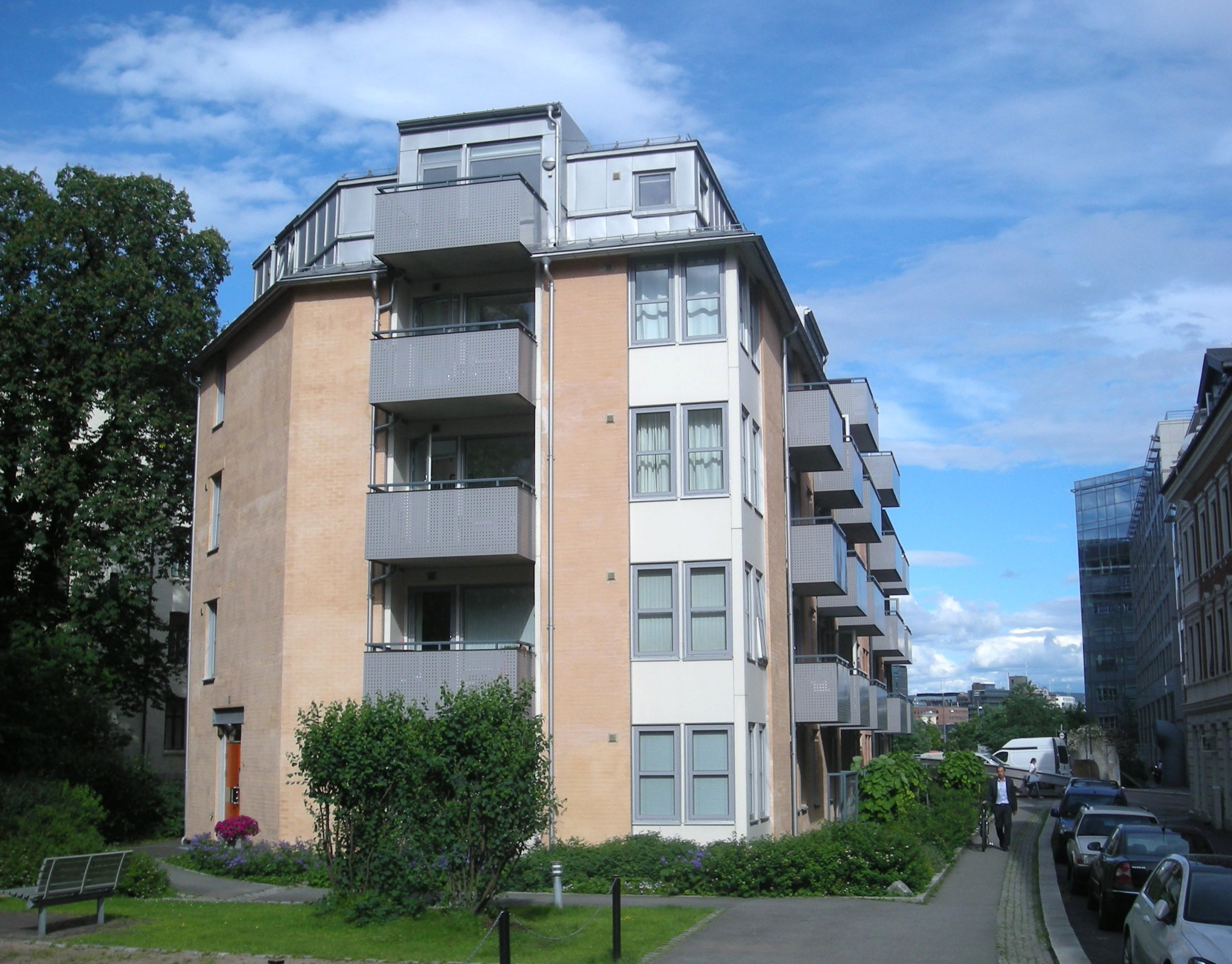 Bebyggelse på nordsiden av Løkkegangen på Ruseløkka, med adresse Løkkegangen 1-3